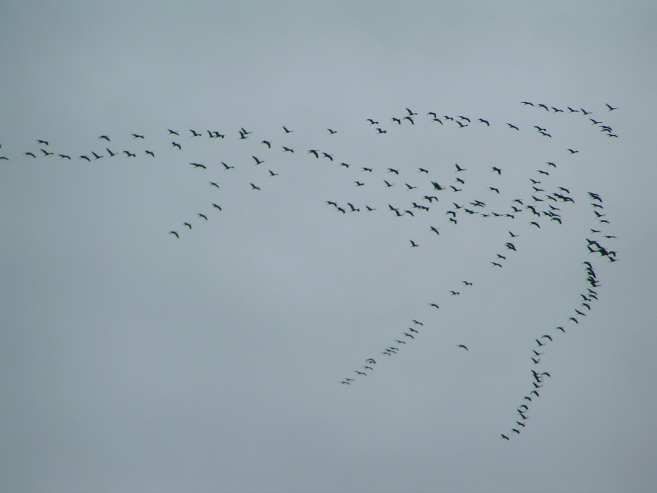 Grus grus migration in Nedde (Haute-Vienne) France